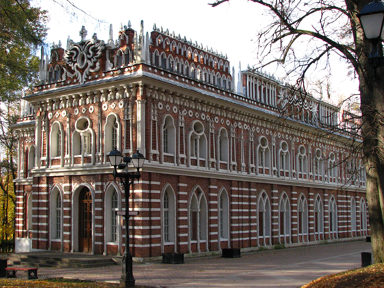 Средний дворец (Оперный дом)